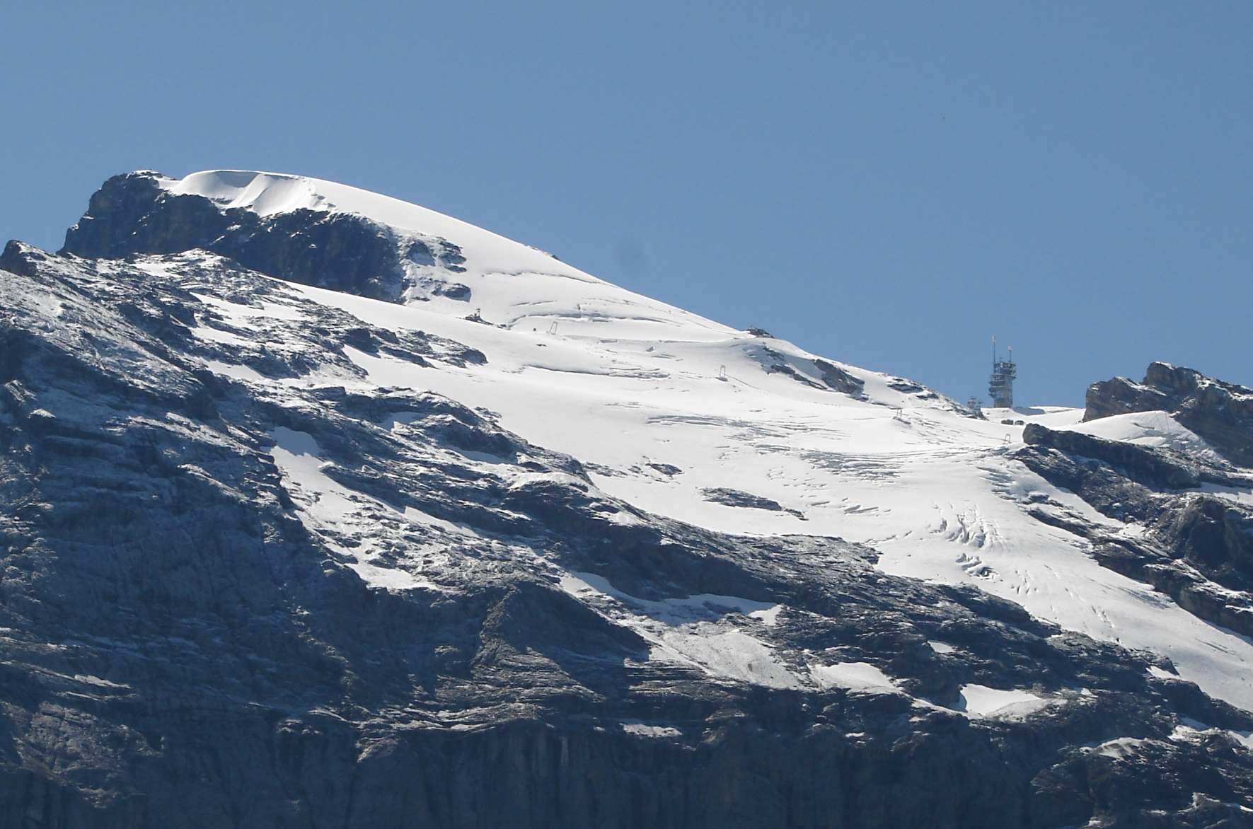 Titlisgletsccher, August 2008